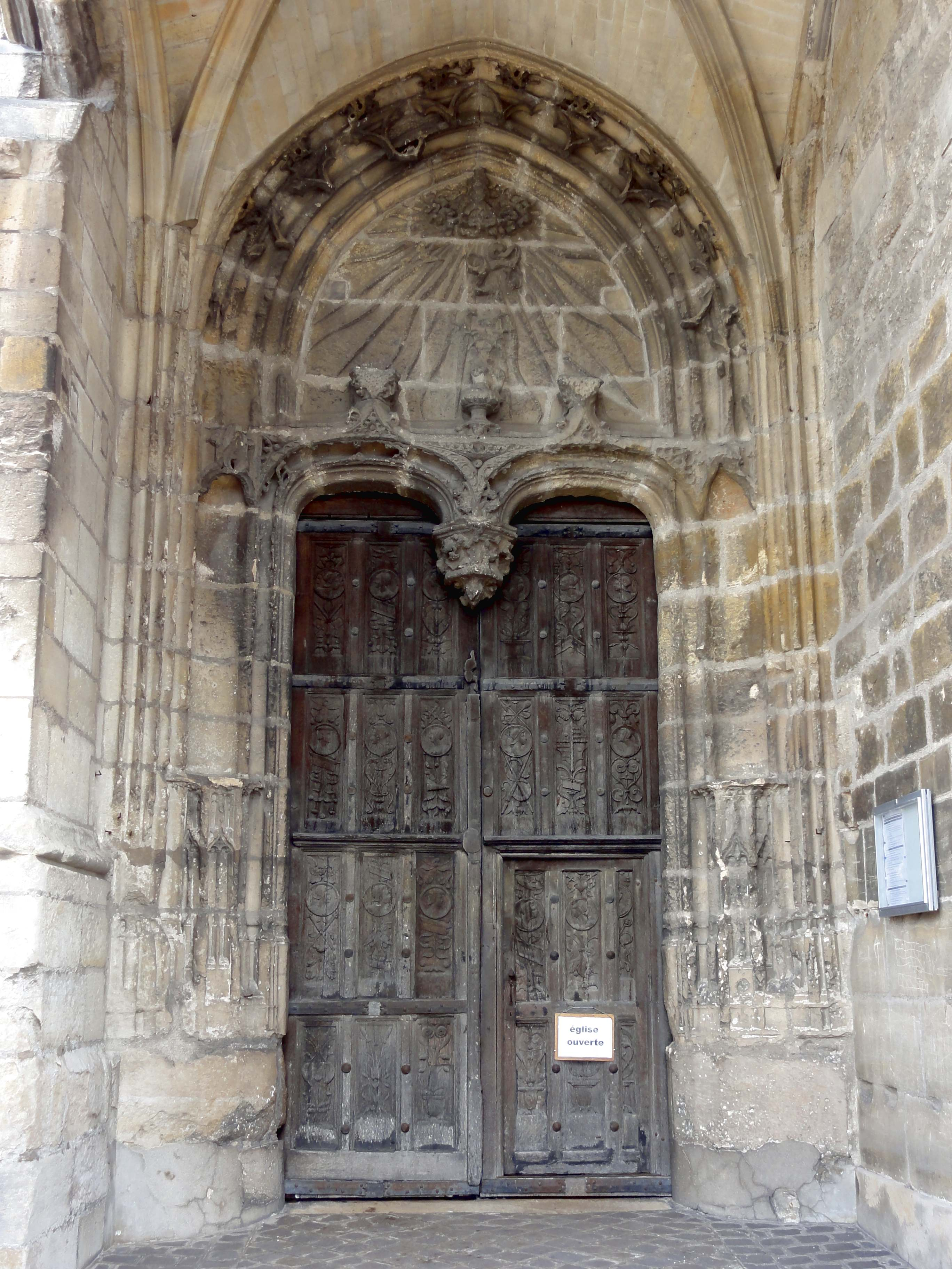 Portail sud de l'église - voir titre.